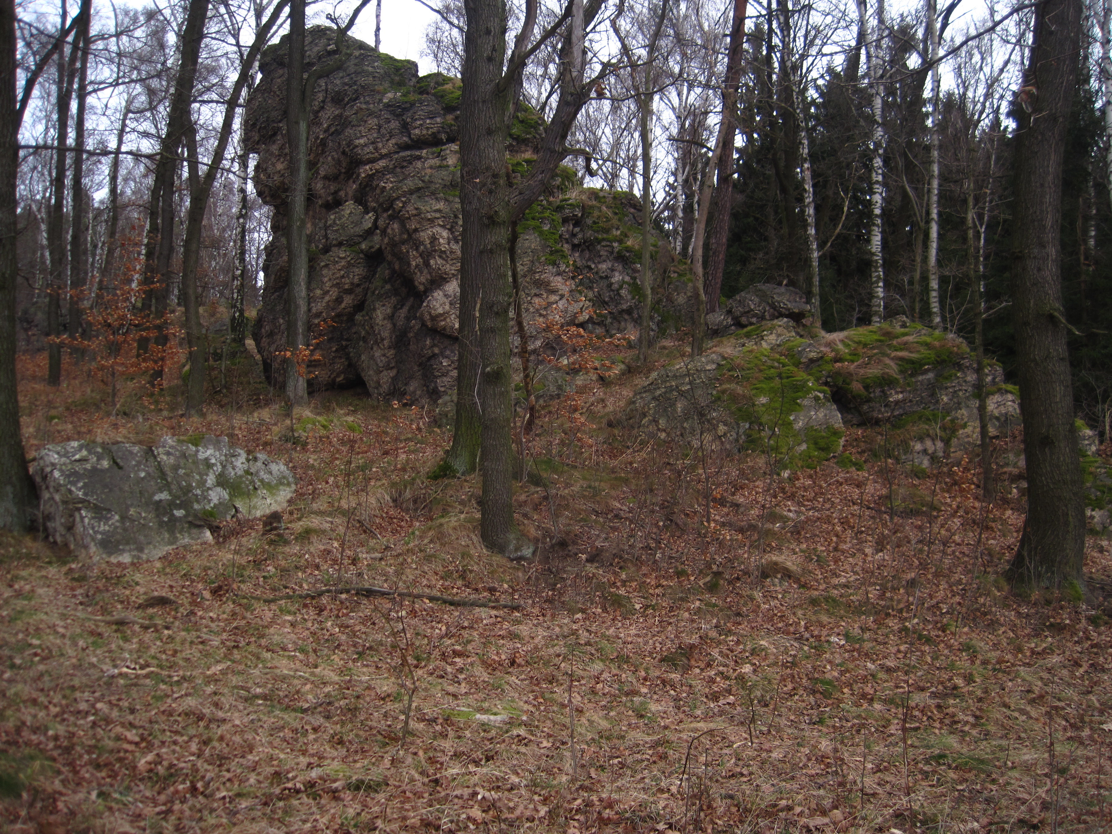 Přírodní památka Bílá skála severozápadně od vesnice Srbská chrání skalní hřebínek tvořený vypreparovanou křemennou žílou při státní hranici s Polskem.